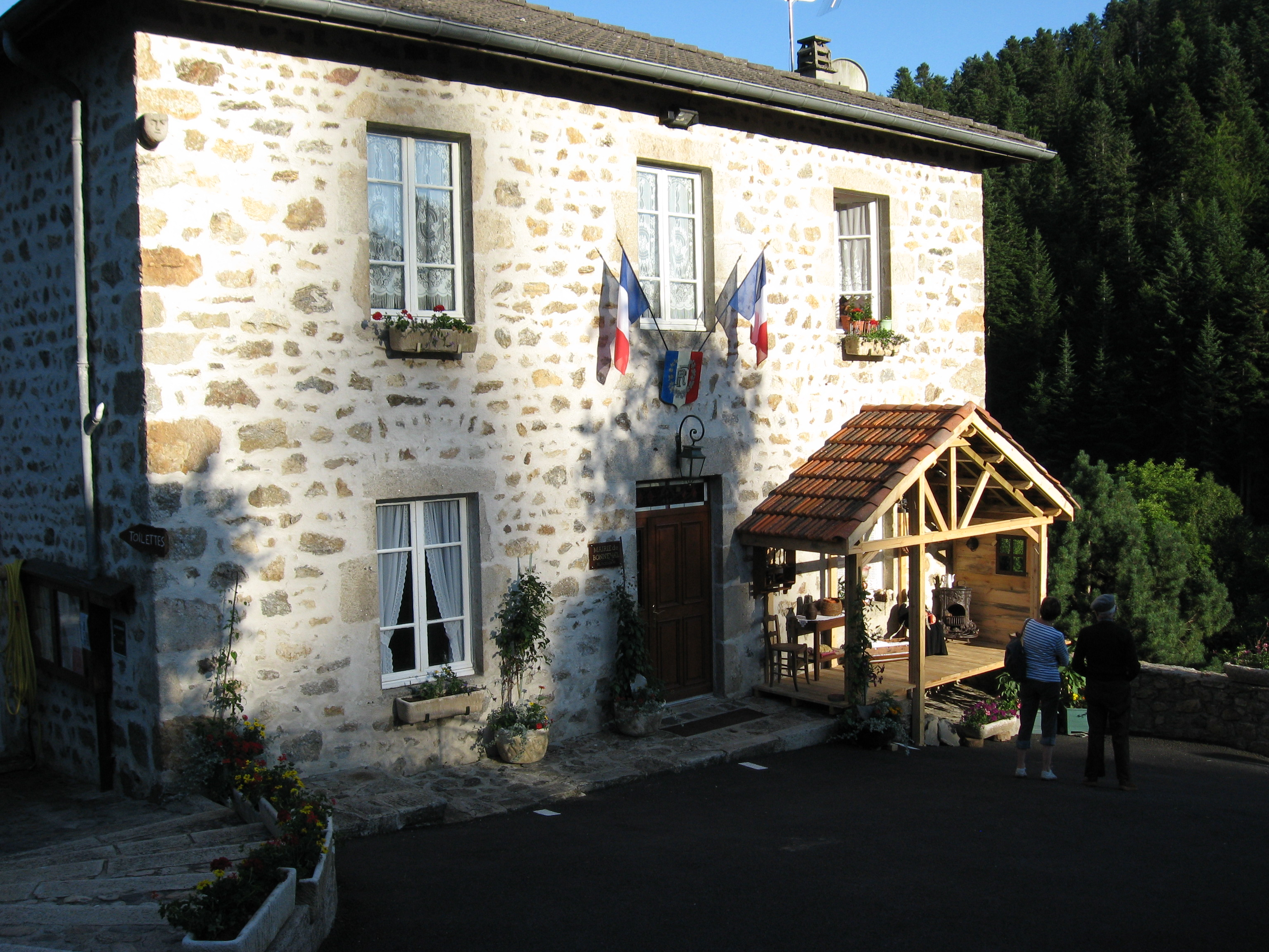 La Mairie qui se situe dans le bourg de Bonneval